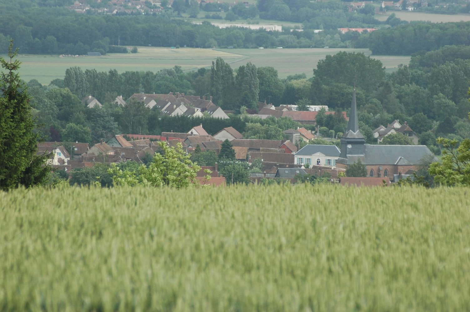 Vue panoramique du village de Saint-Aubin-en-Bray